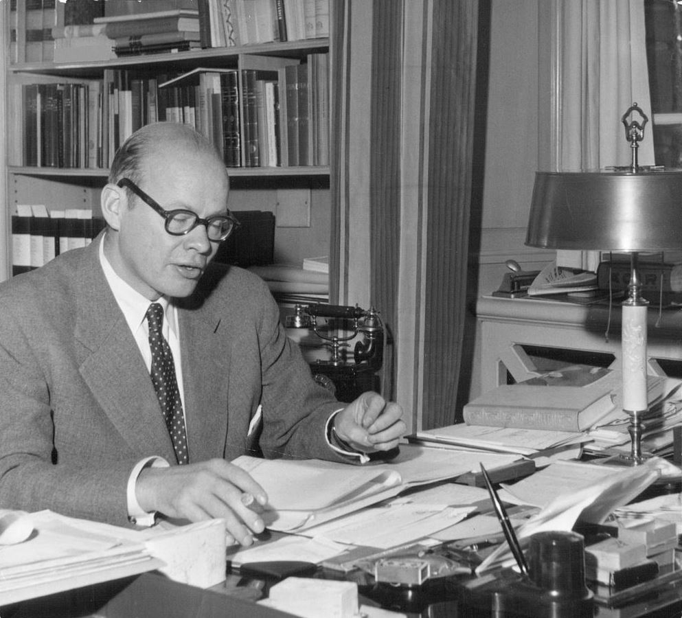 Gösta Agrenius (1914-2000), svensk politiker.